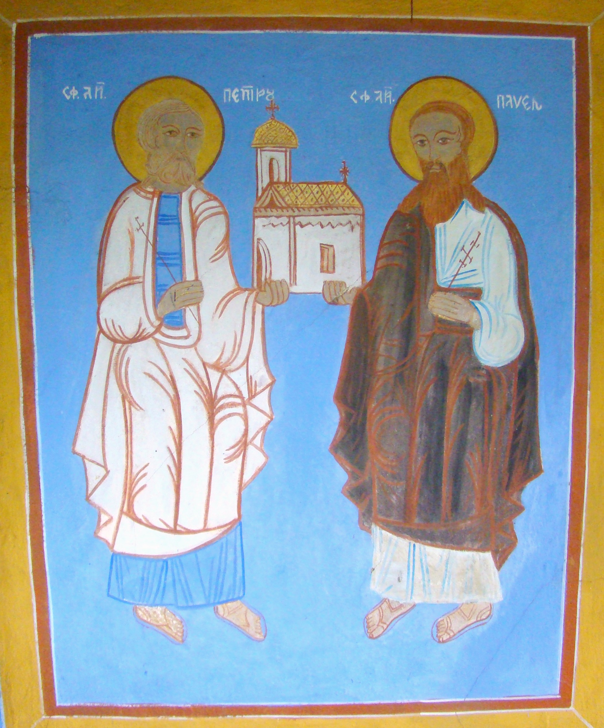 Biserica de lemn „Cuvioasa Paraschiva” din Ciuperceni, județul Gorj